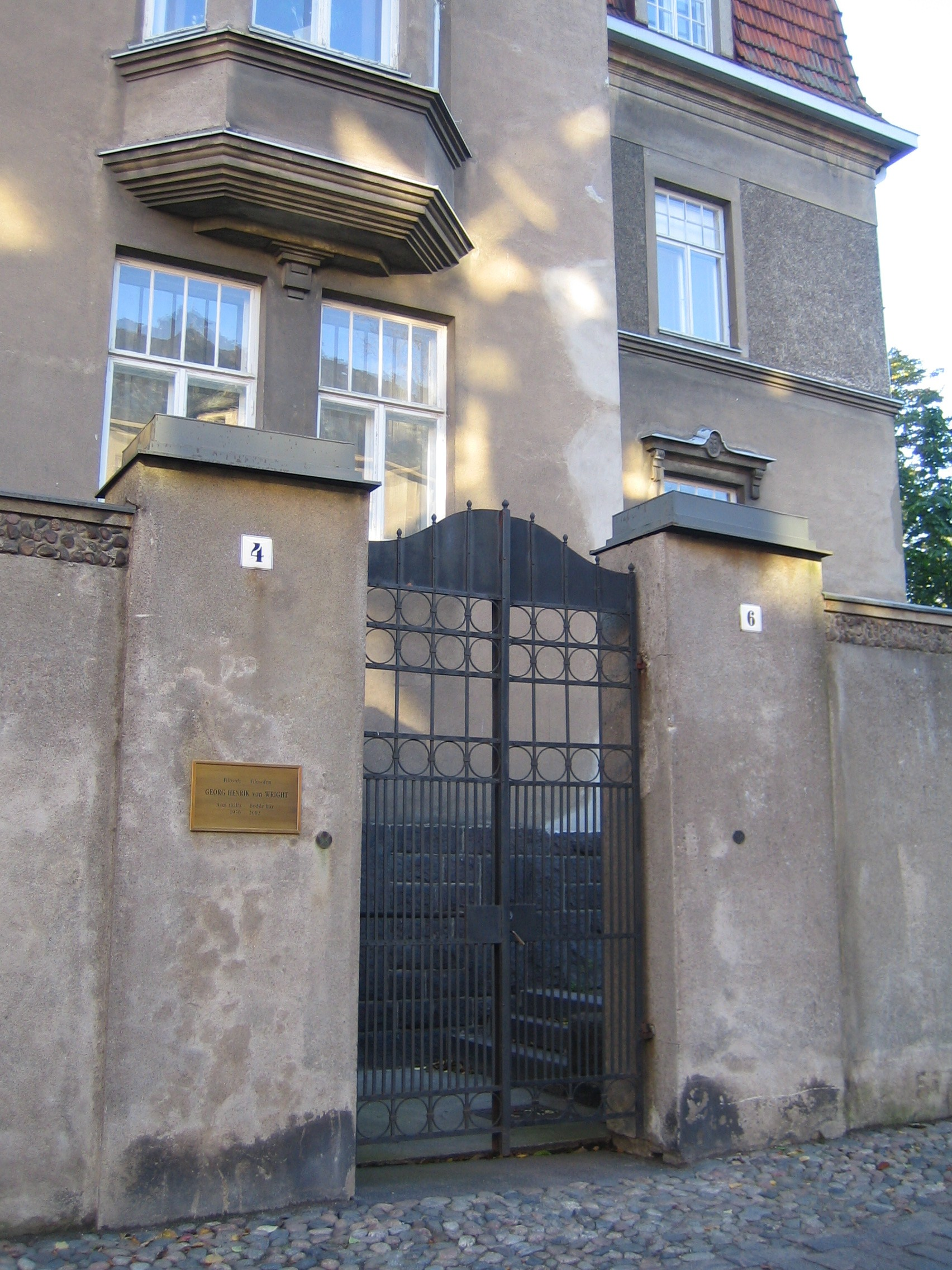 Georg Henrik von Wright's home, Eira, Helsinki, Finland.